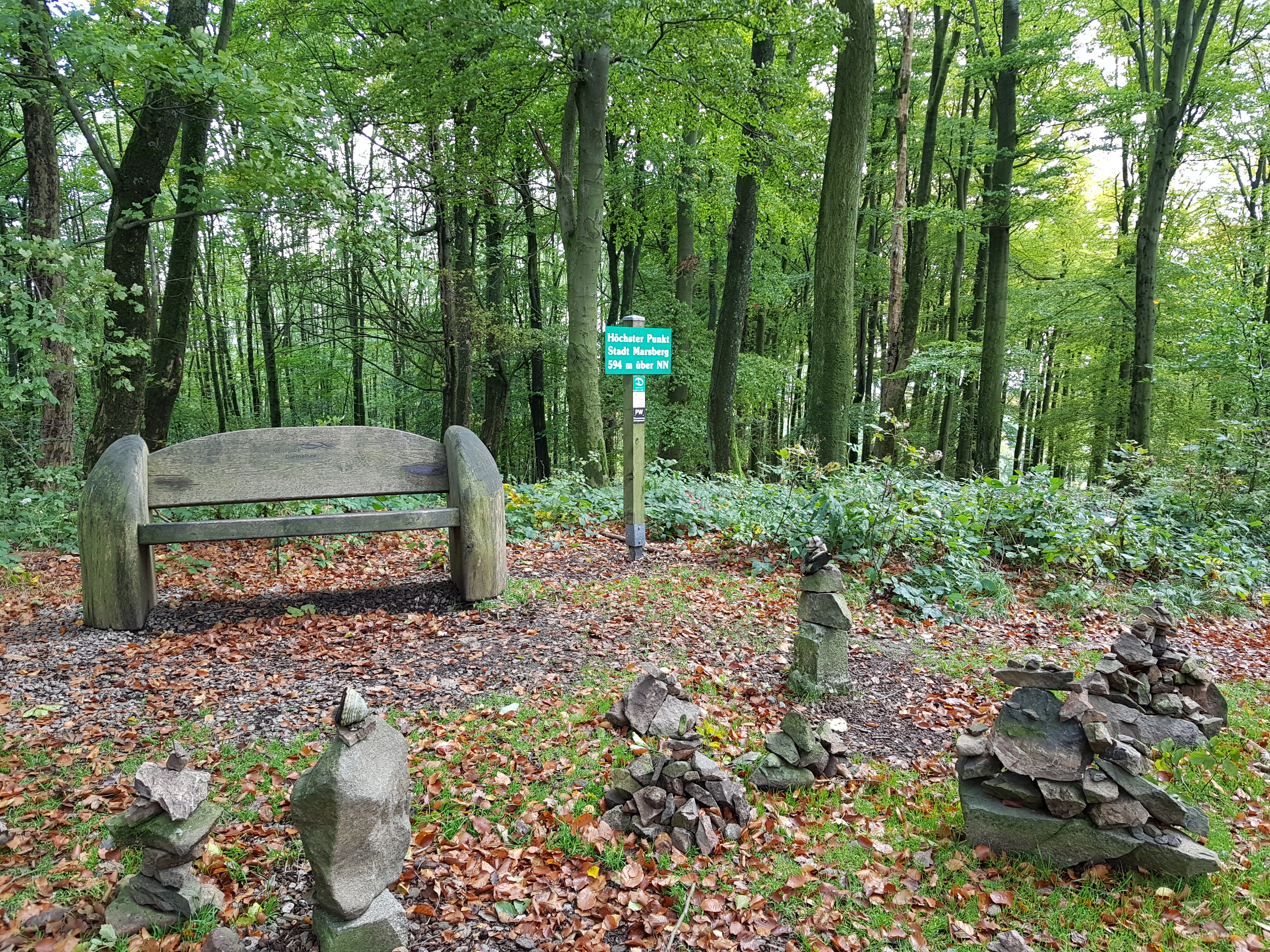 Höchster Punkt Marsberg